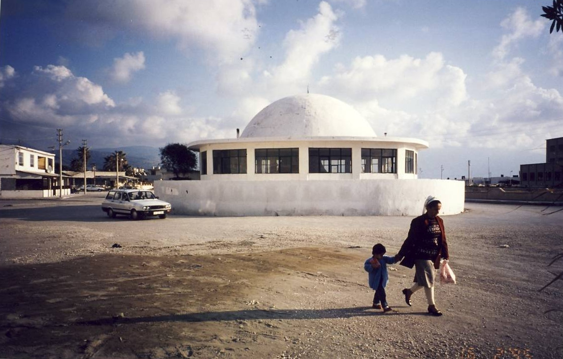 Khidr-Heiligtum bei Samandag/Türkei mit einem Fahrzeug bei der dreifachen rituellen Umkreisung